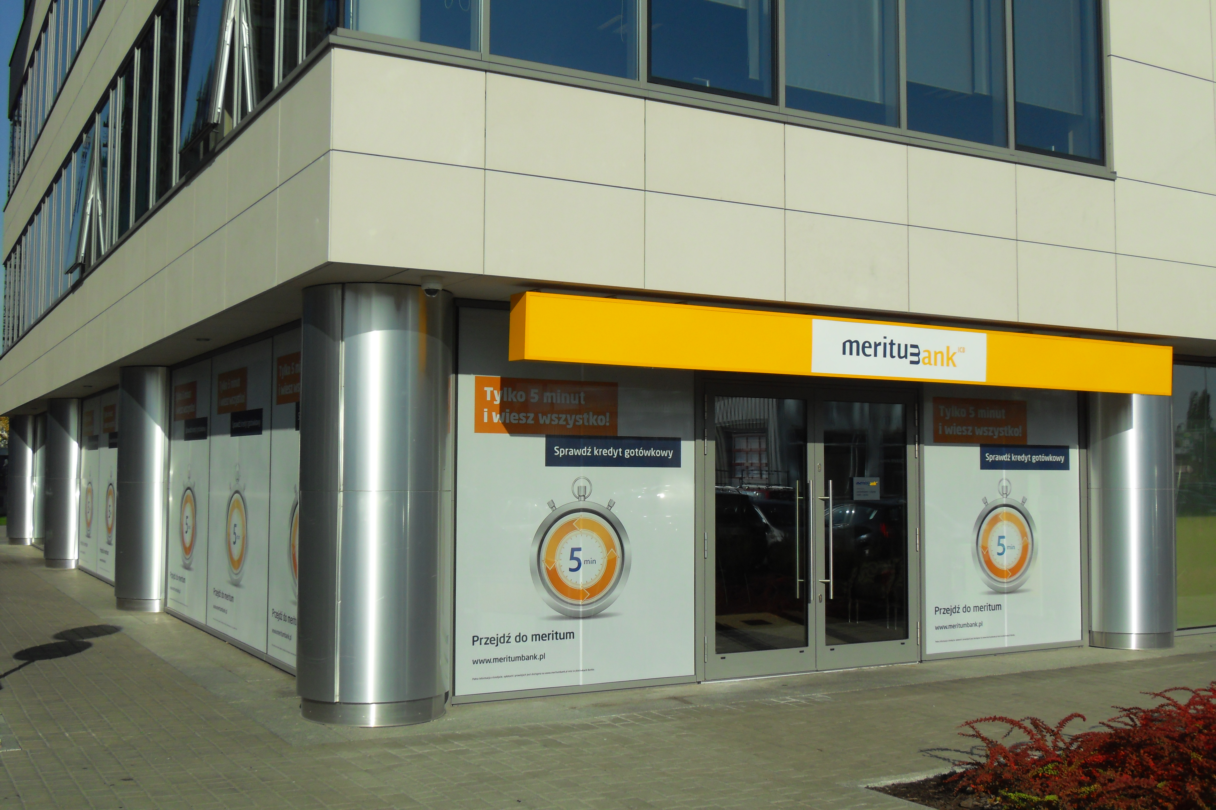 Olivia Business Centre. Gdańsk Oliwa, al. Grunwaldzka 472, Meritum Bank.